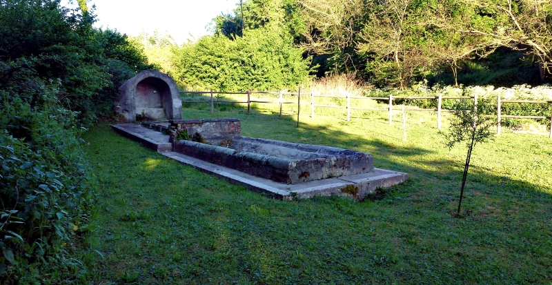 La "fontana vecchia" fu edificata nel sec. XVI. E' la più vecchia fontana di Oriolo Romano.